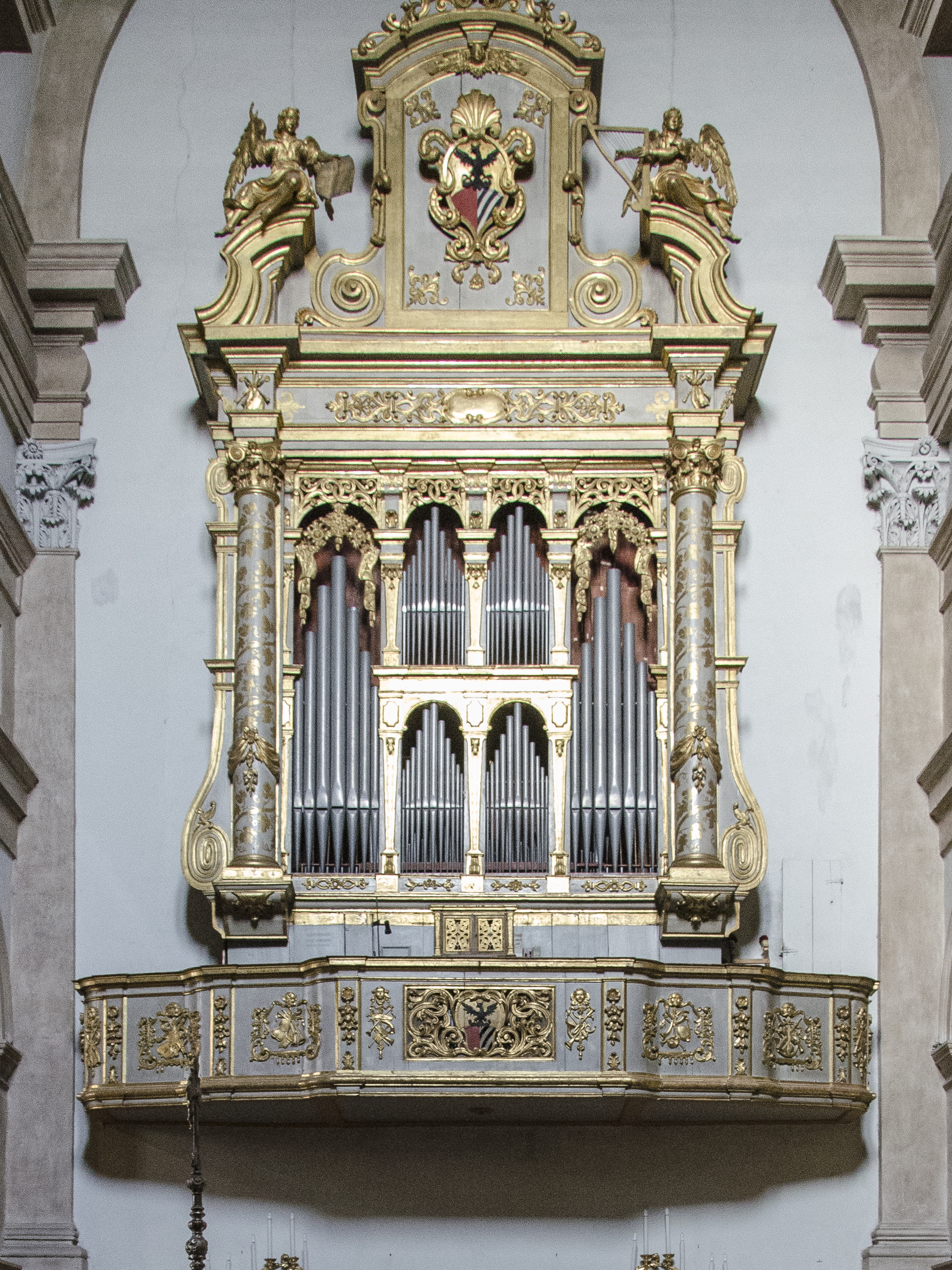 Veduta dell'organo